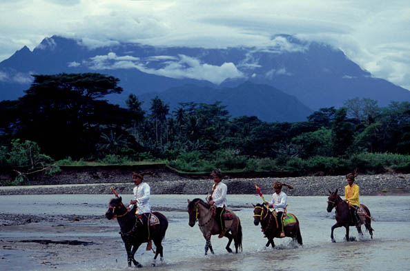 Pahlawan berkuda